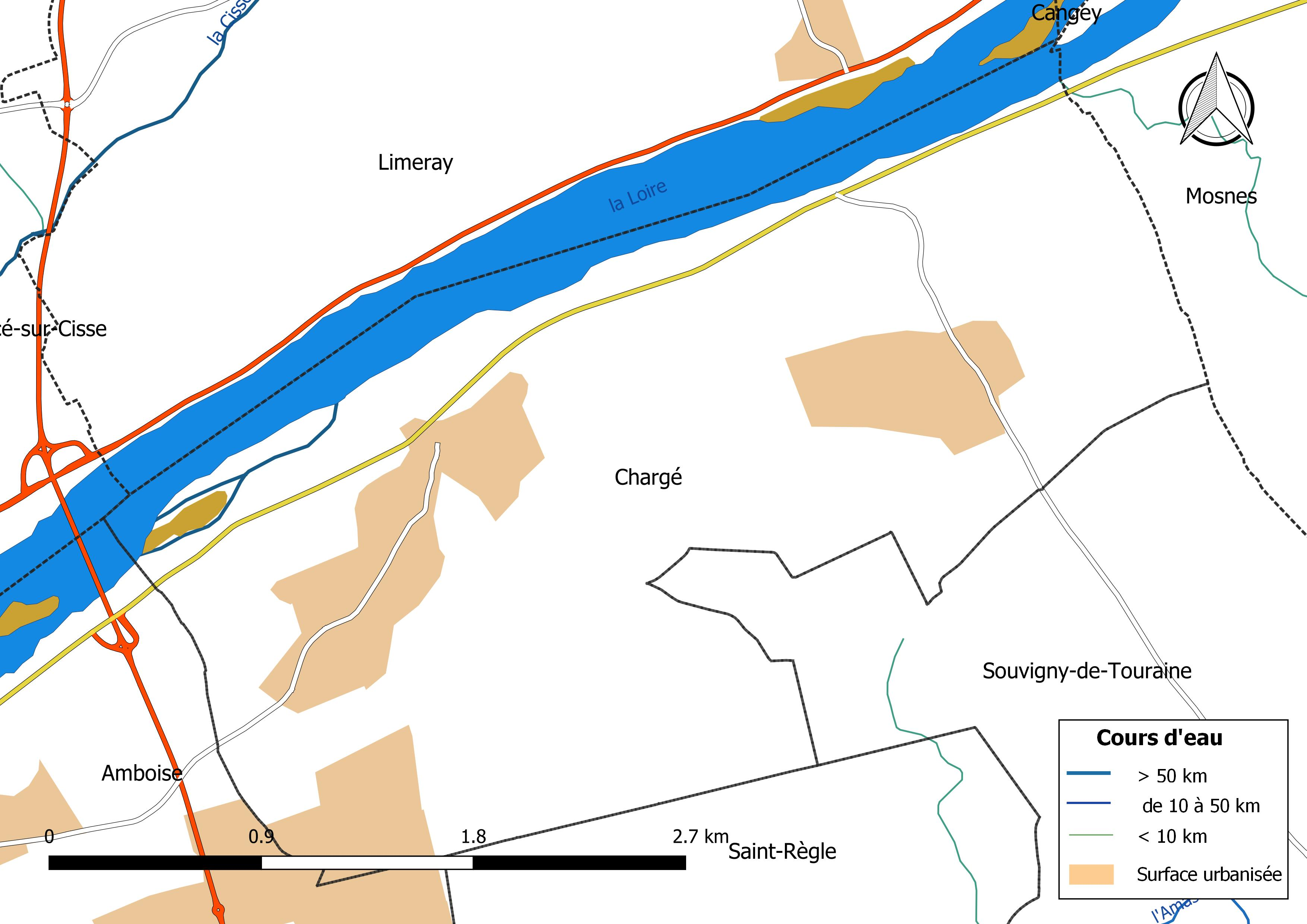 Carte du réseau hydrographique de la commune de Chargé (France).